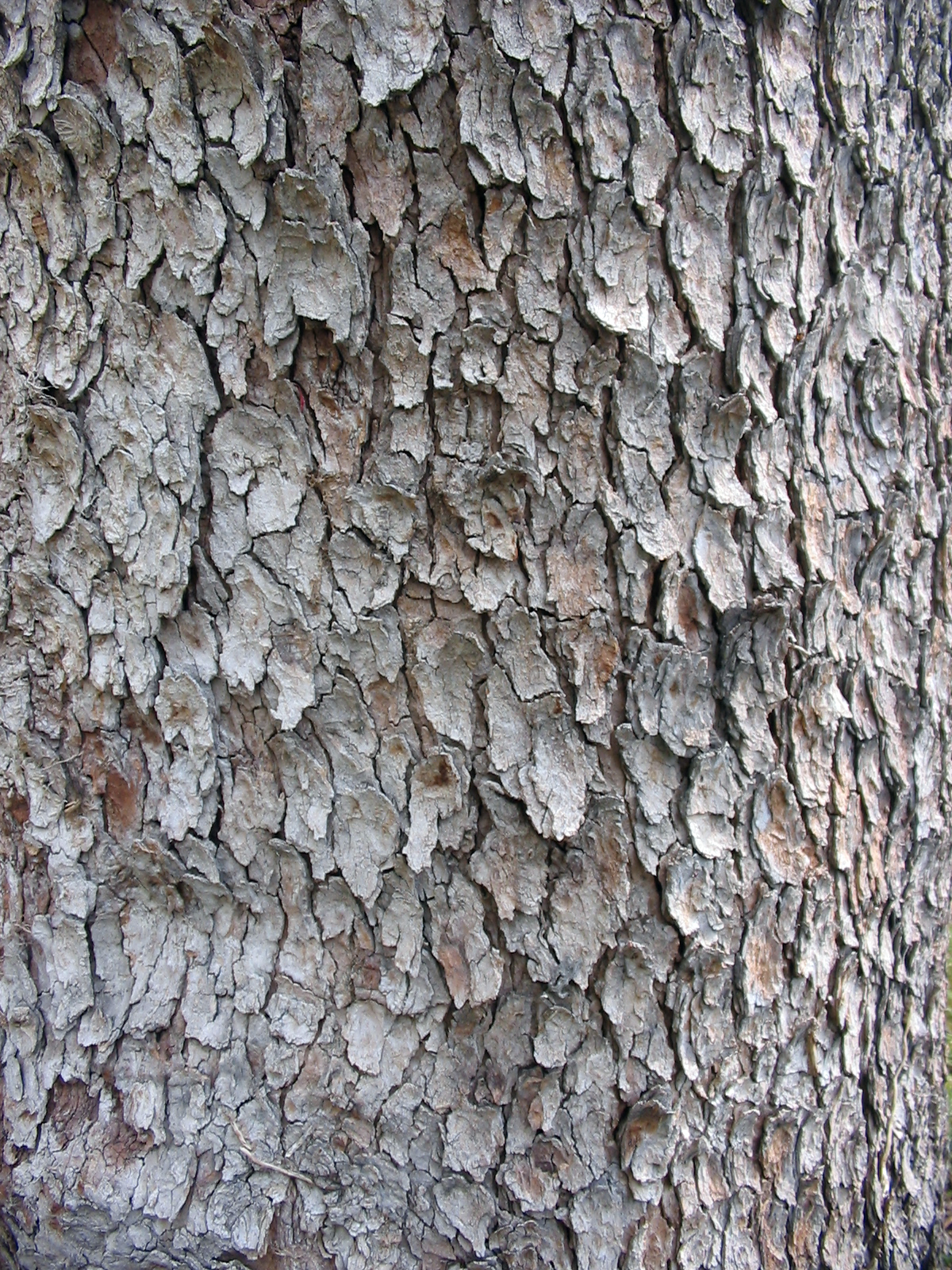 Fotografía de la textura del tronco del Acer pseudoplatanus de las aceraceae, habita en el sur y centro de Europa, extendiéndose por el oeste de Asia, en Español Arce blanco. La fotografía está realizada en el Real Jardín Botánico de Madrid. España. El 4 de Abril de 2007.